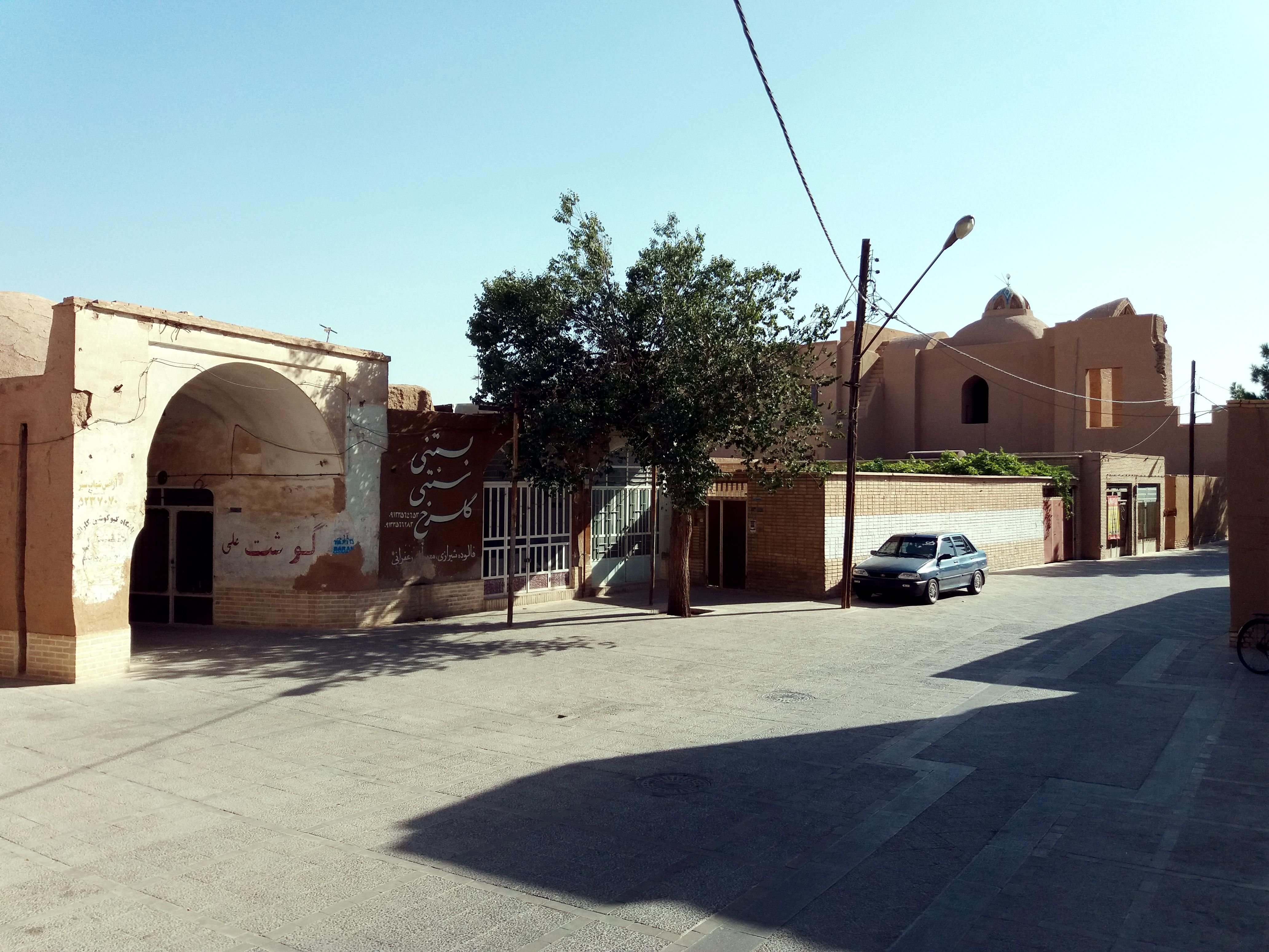 موضع ملتکیه چهار منار یزد